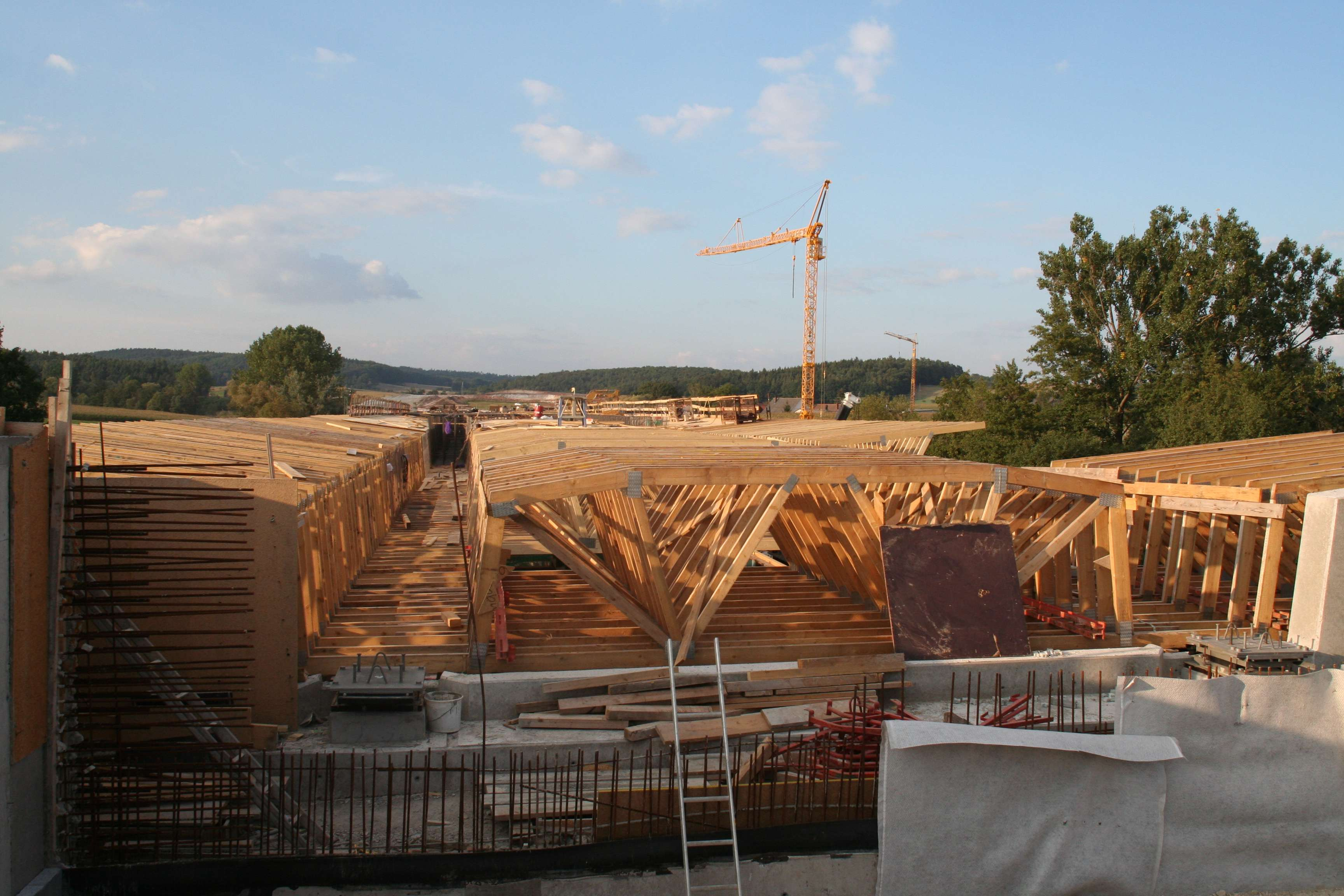 Füllbachtalbrücke, bei Zeickhorn (Grub am Forst) in Oberfranken Schalungsbau Überbau